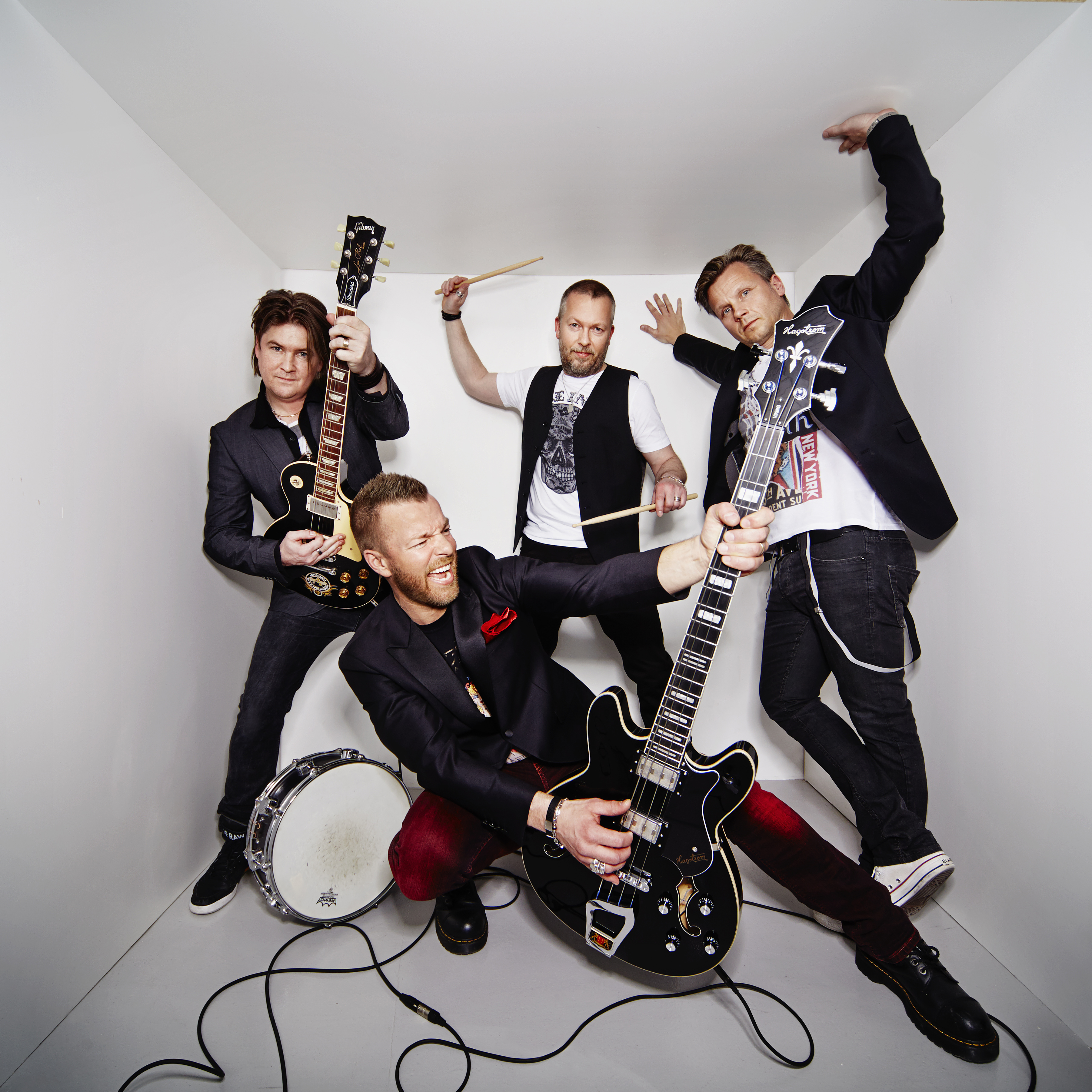 Dansbandet Arvingarna.